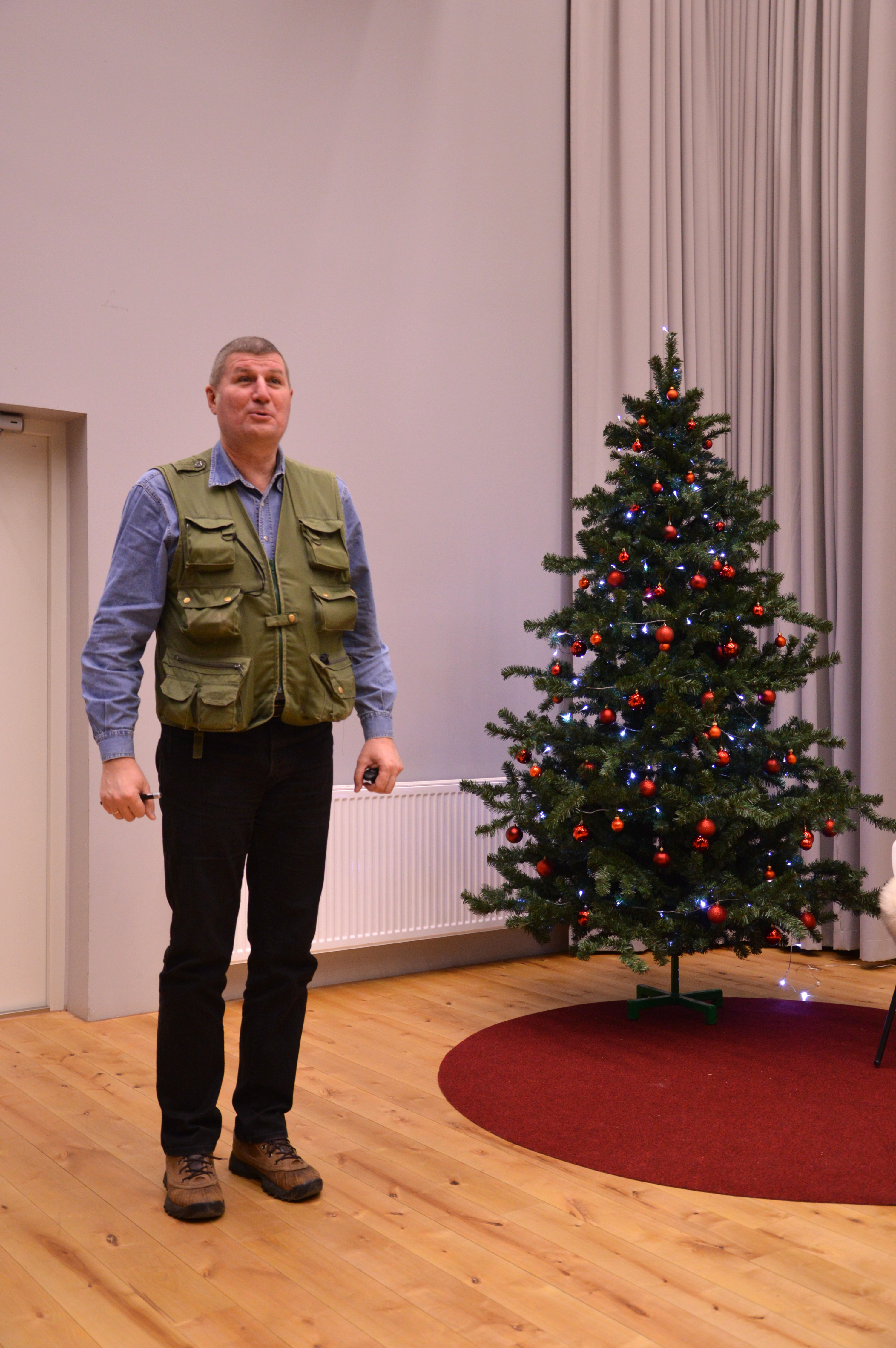 Urmas Tartes pidamas loengut piltide keelest Teadusfoto 2013 lõpuüritusel.